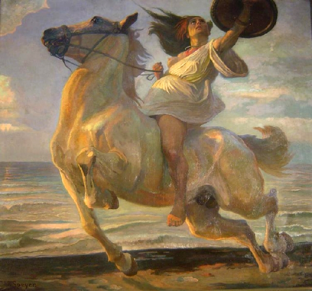 Ritt am Strand / Amazone am Pferd